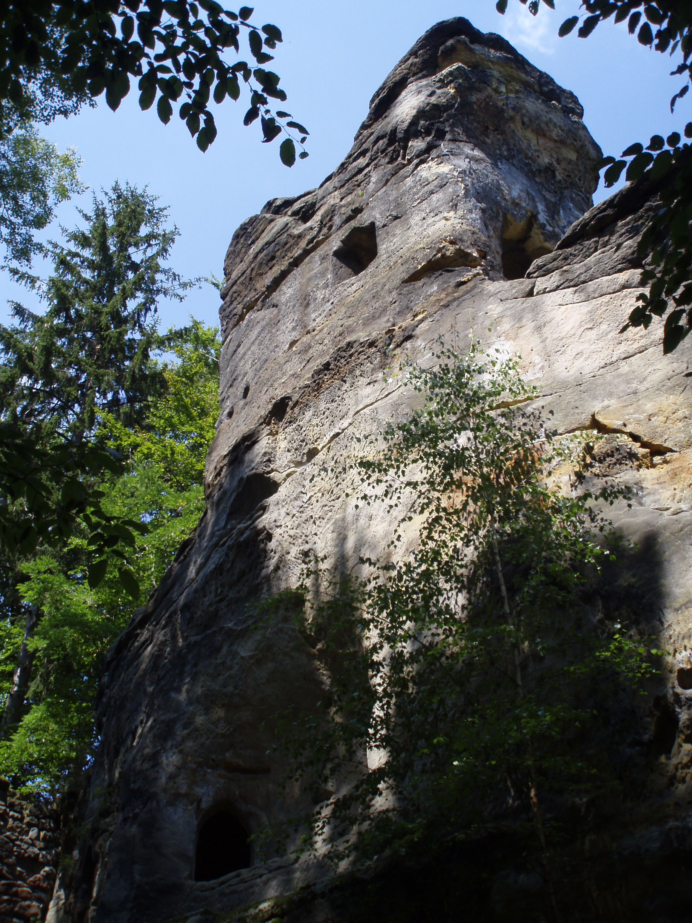 Skalní hrad Svojkov, ruina poblíž Zákup